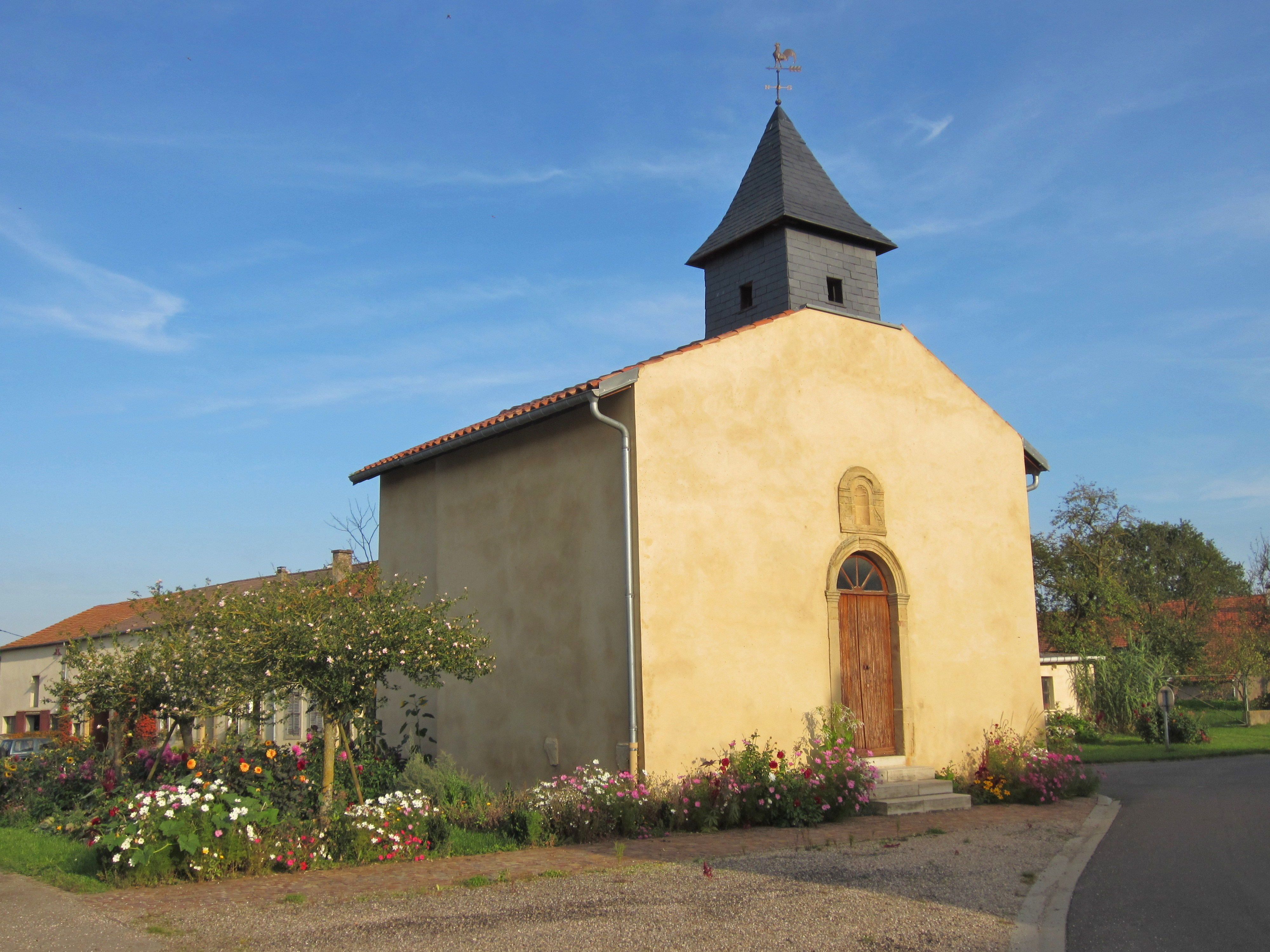 Description chapelle Porcher chapelle Porcher